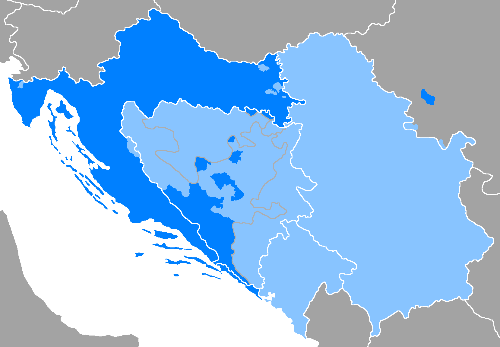 Idioma croata Donde es hablado Resto de hablas serbocroatas